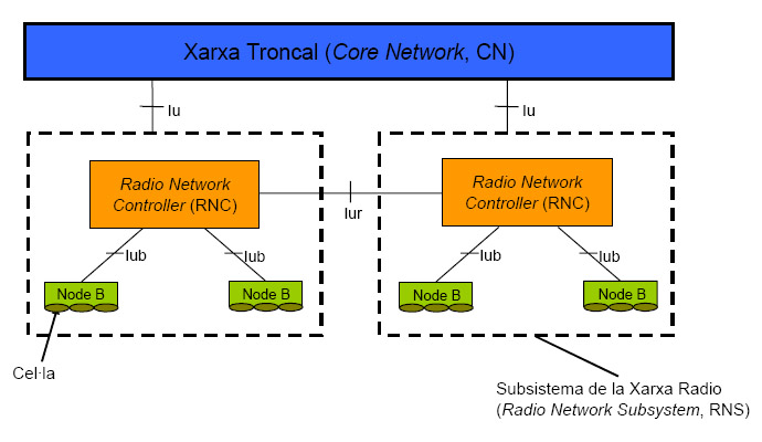 Esquema d'una xarxa troncal en UMTS